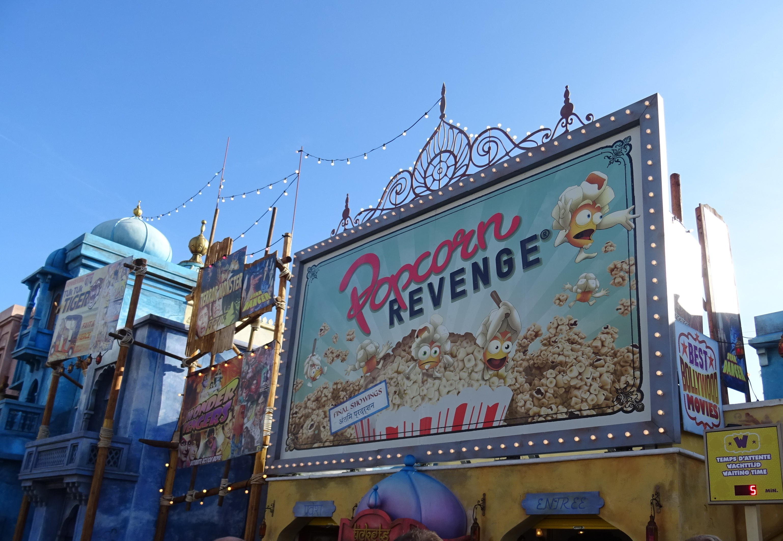 Popcorn Revenge à Walibi Belgium